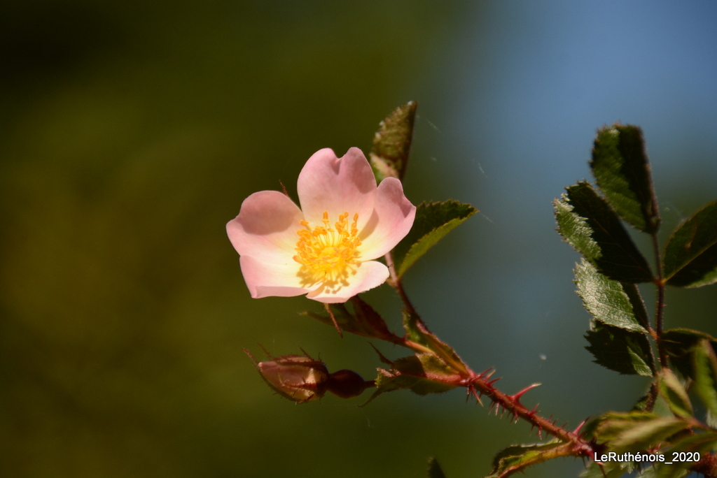 Rosa x aveyronensys